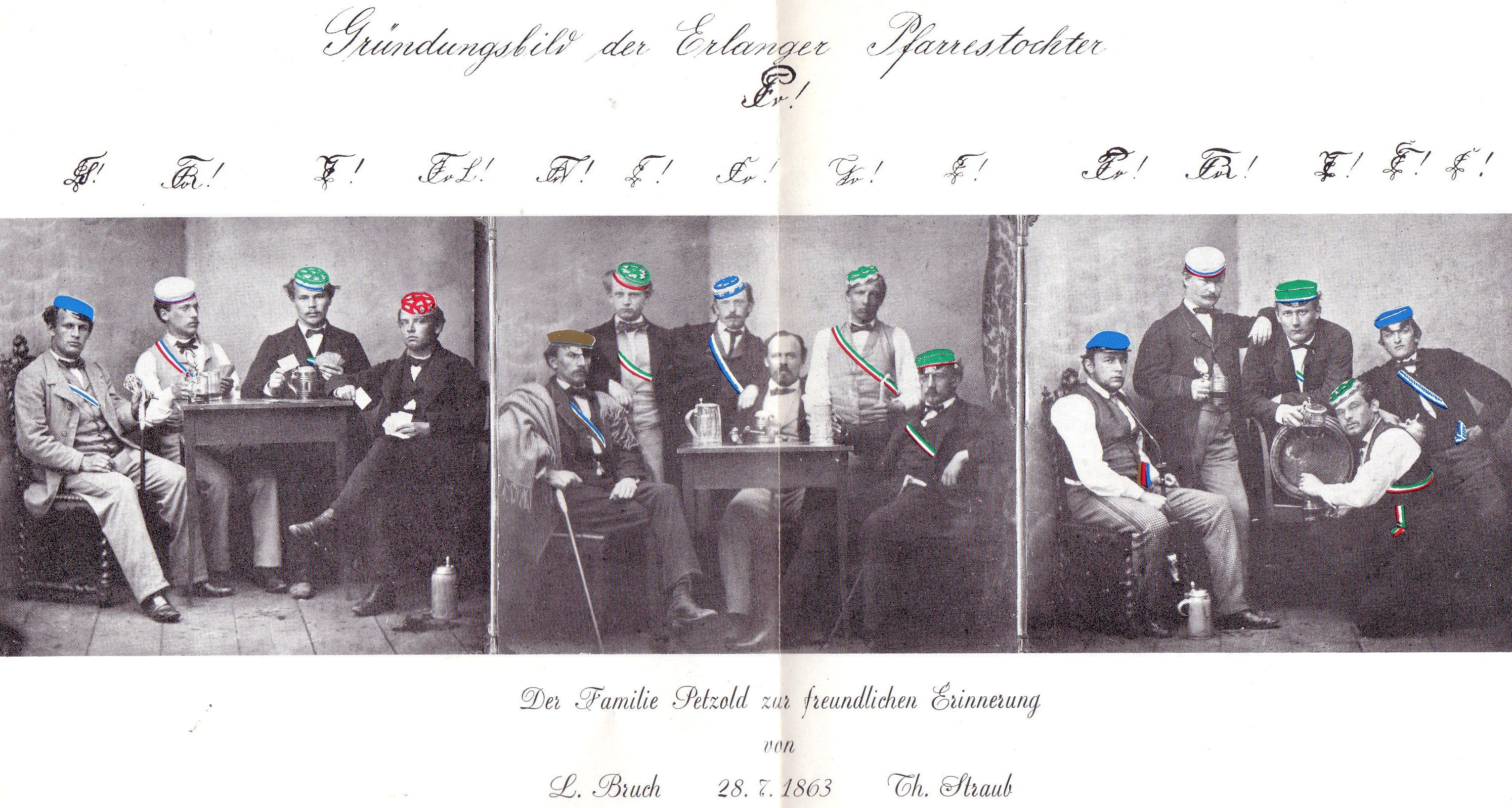 Kolorierte Fotografie der Gründer der Erlanger Pfarrerstochter